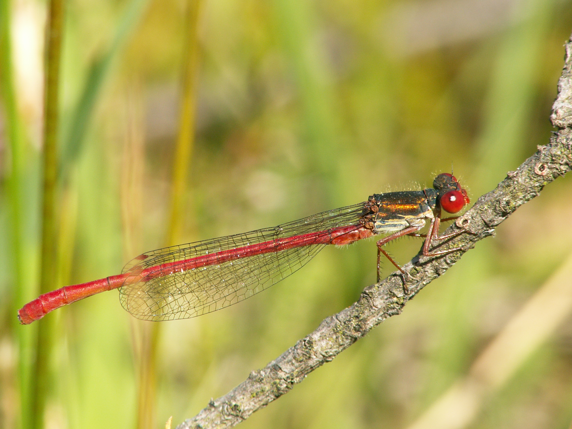 Ceriagrion tenellum male Brunssummer Heide Netherlands